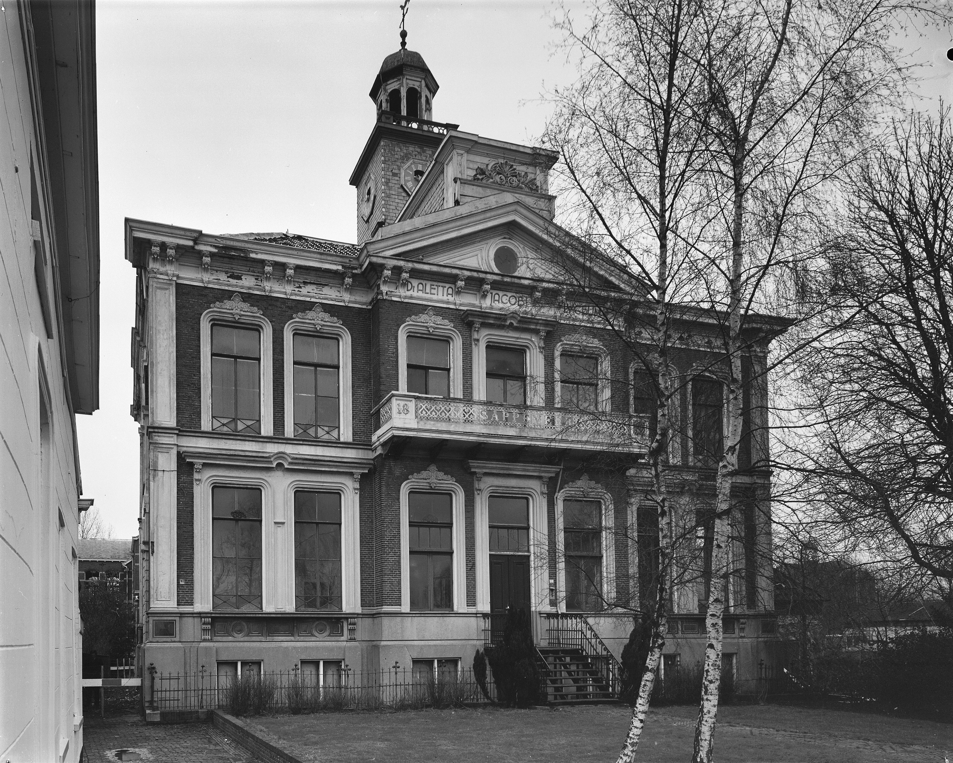 voorgevel